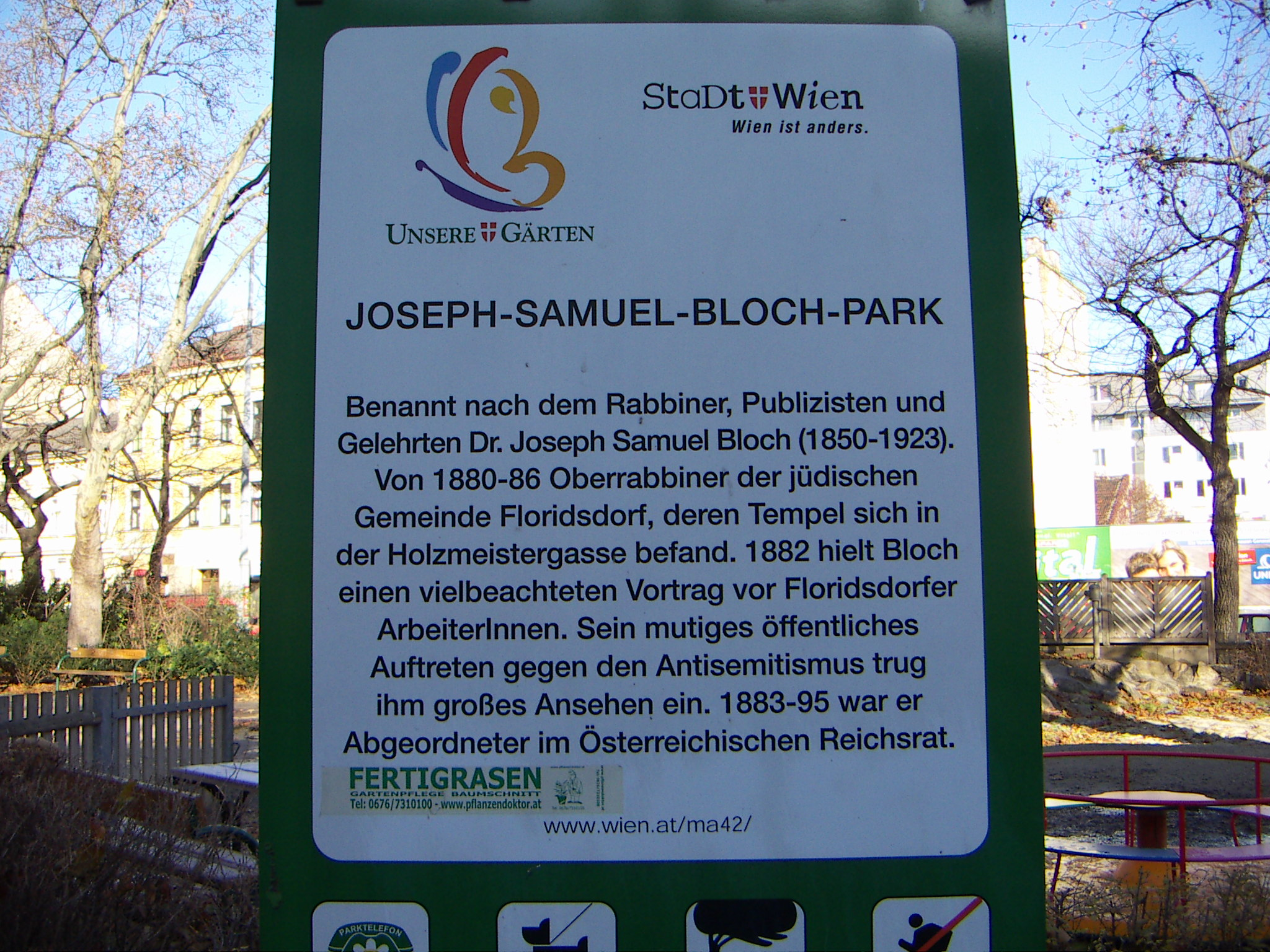 Joseph-Samuel-Bloch-Park in Floridsdorf: Joseph Samuel Bloch, von 1880 bis 1886 Oberrabbiner der Synagoge Floridsdorf.